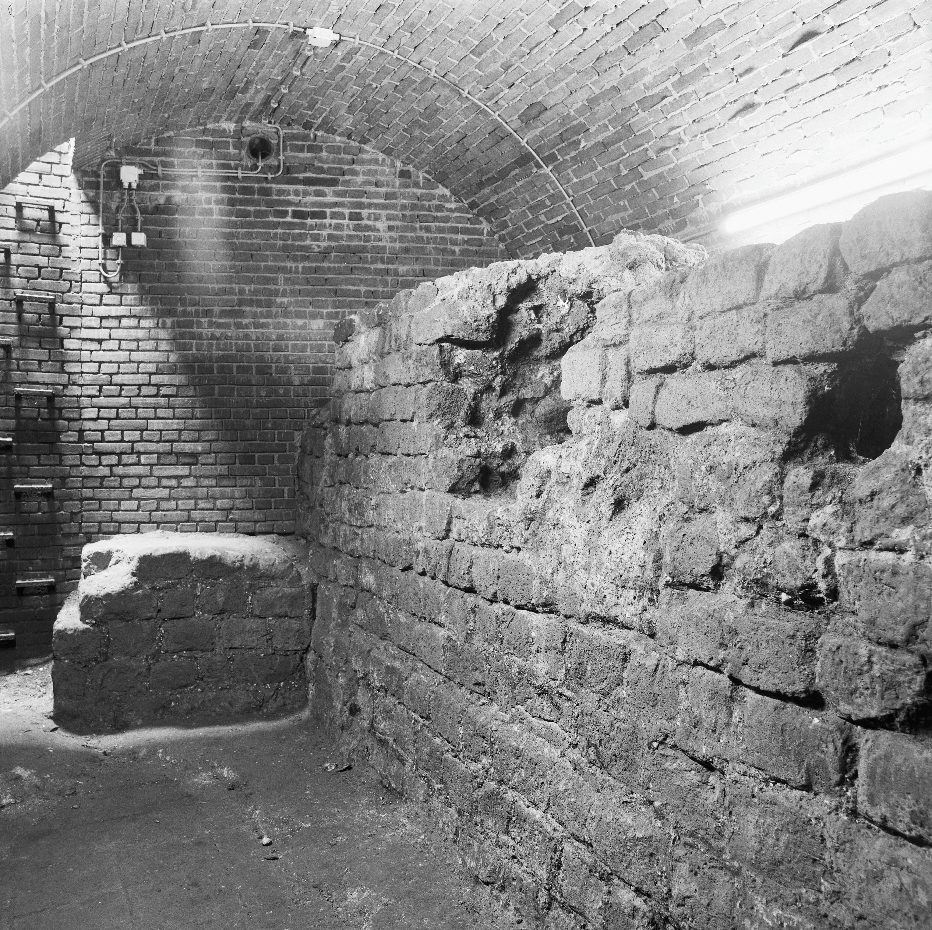 restant onder Domplein van Romeins Castellum